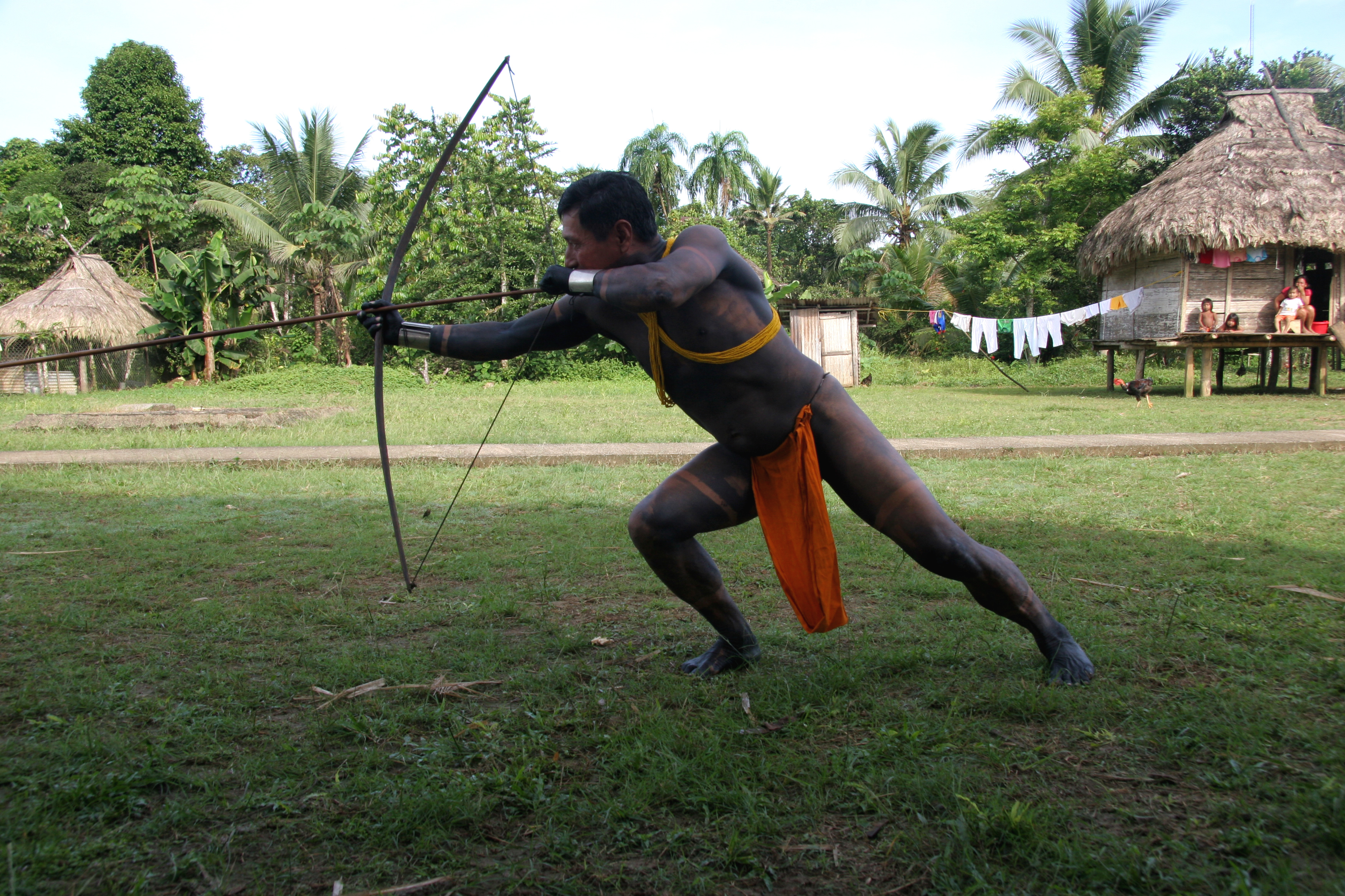 panama, darien, démonstration de tir à l'arc par un embera